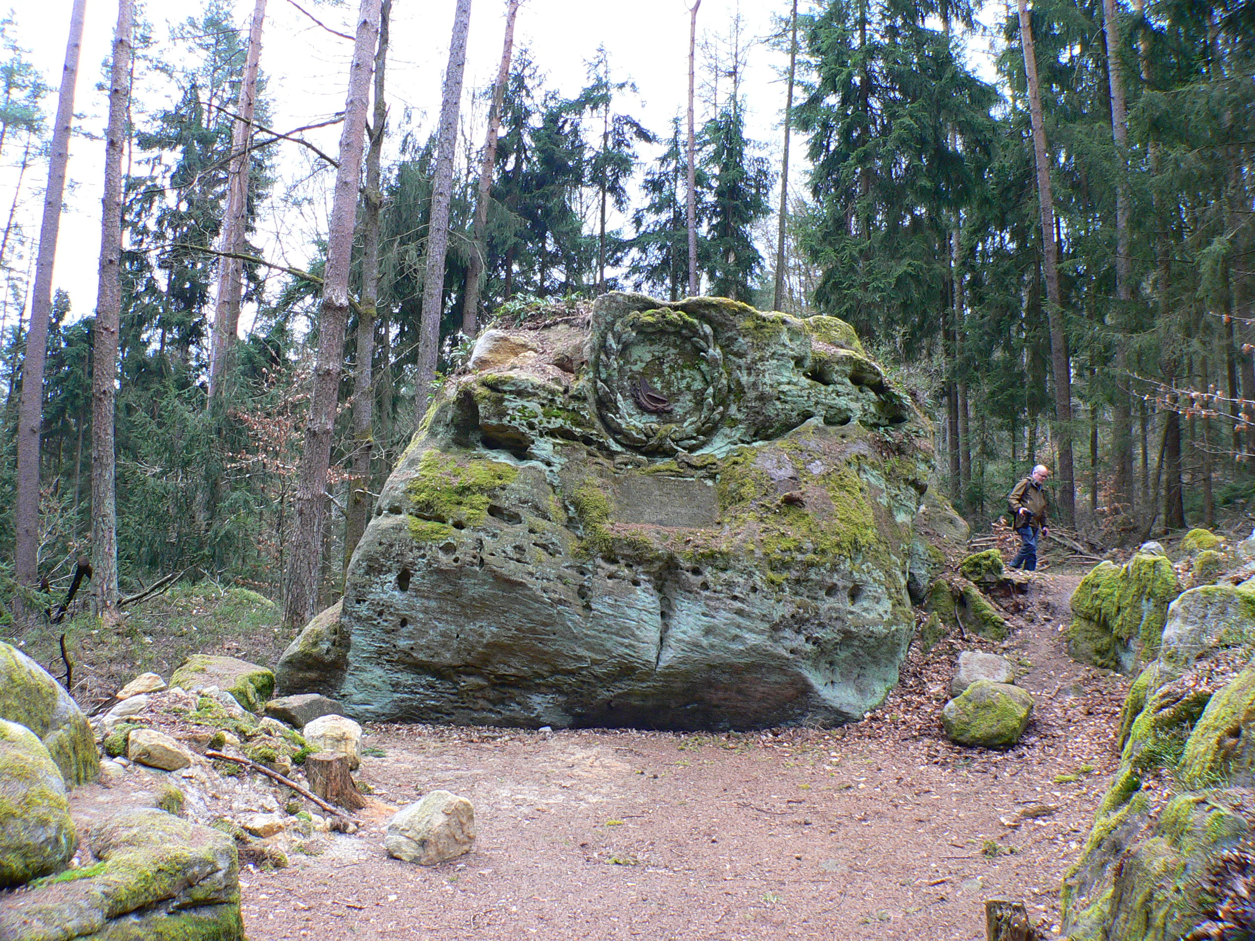 Bismarckstein im Landschaftspark Schloss Hohenstein, Ahorn bei Coburg, Bayern, Oberfranken, Deutschland